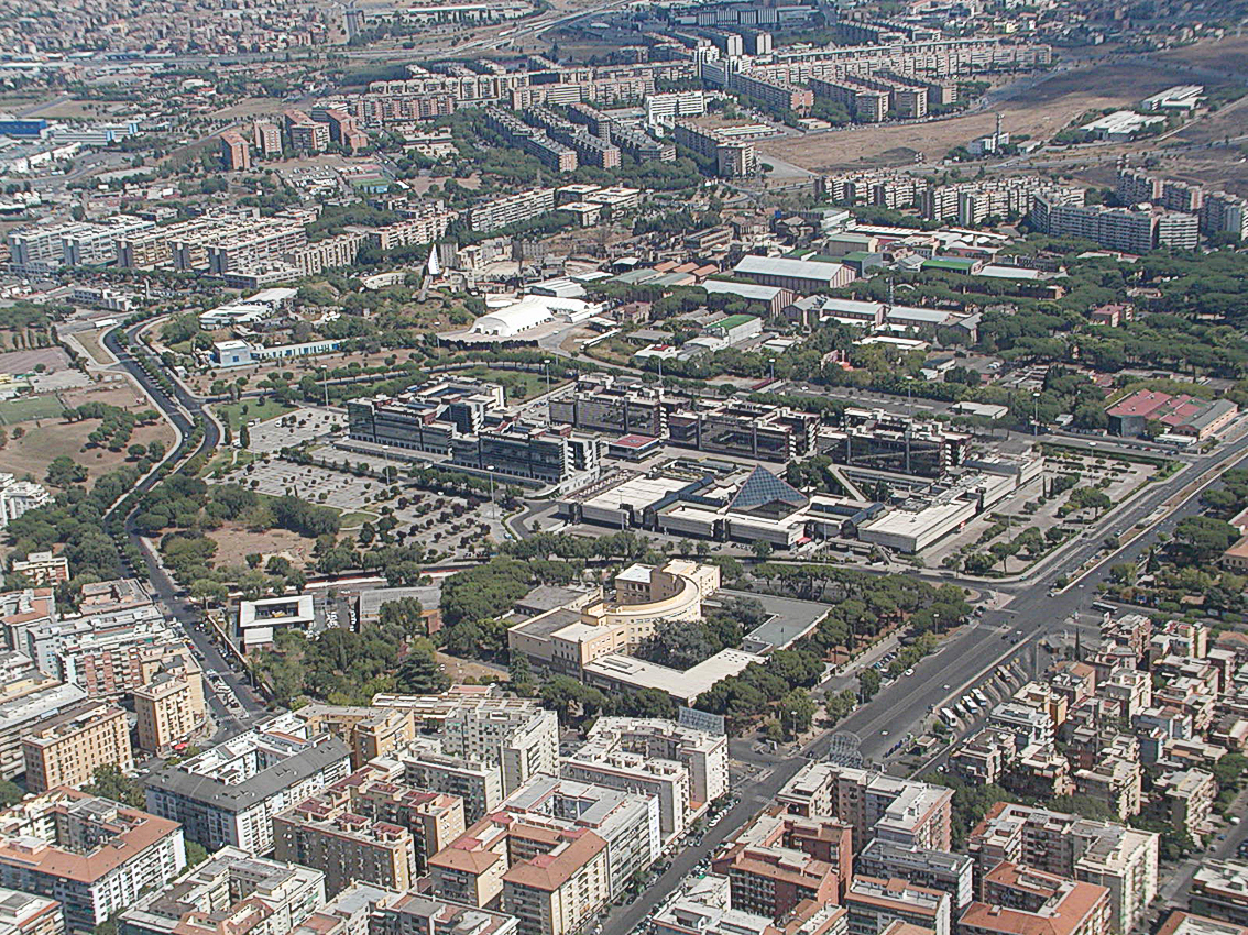 Rom